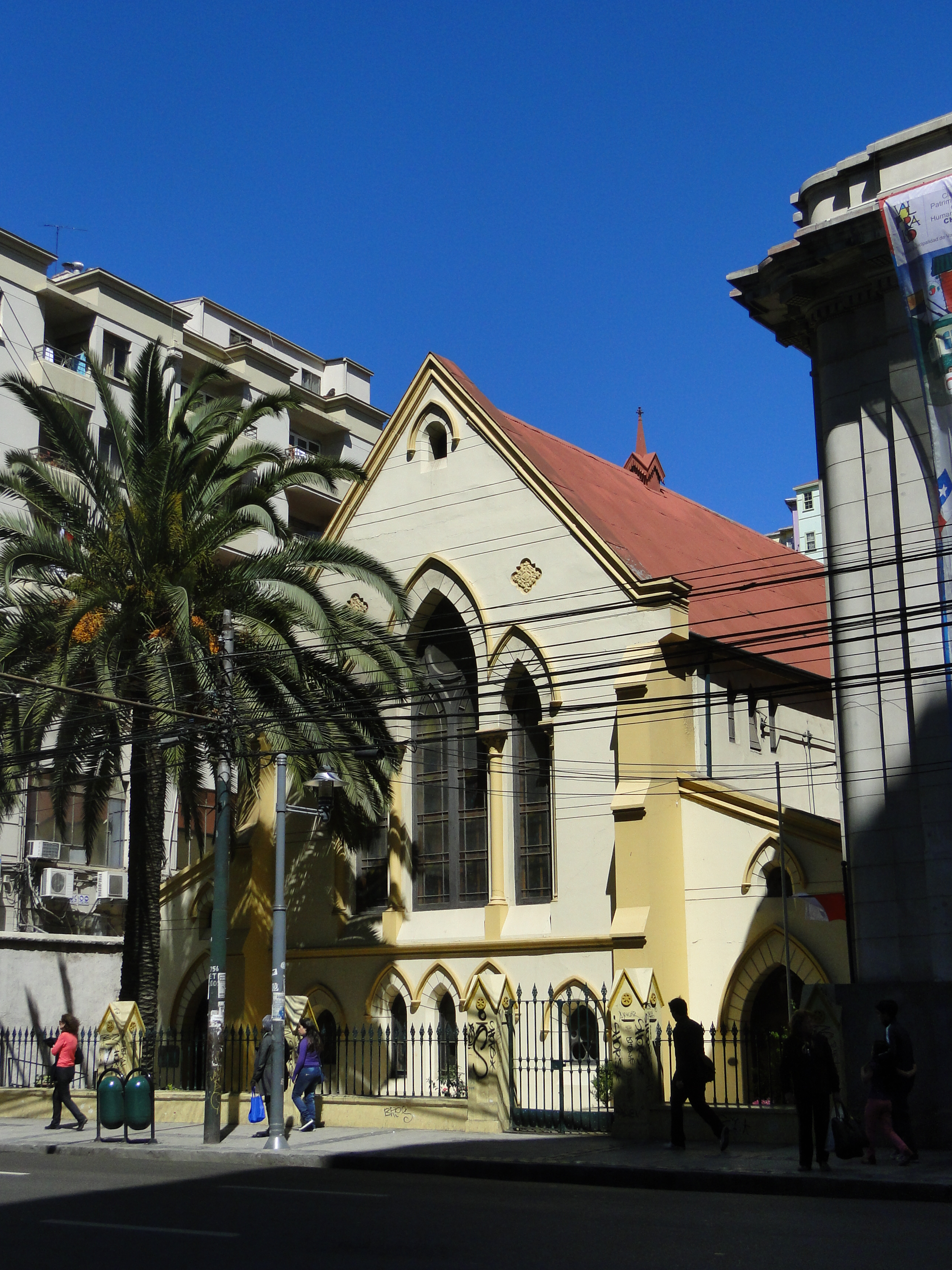 Iglesia presbiteriana de Valparaíso (hasta 1946 el templo perteneció a la Union Church); la edificación fue declarada Monumento Histórico el 20 de mayo de 2003. This is a photo of a national monument in Chile: Unknown